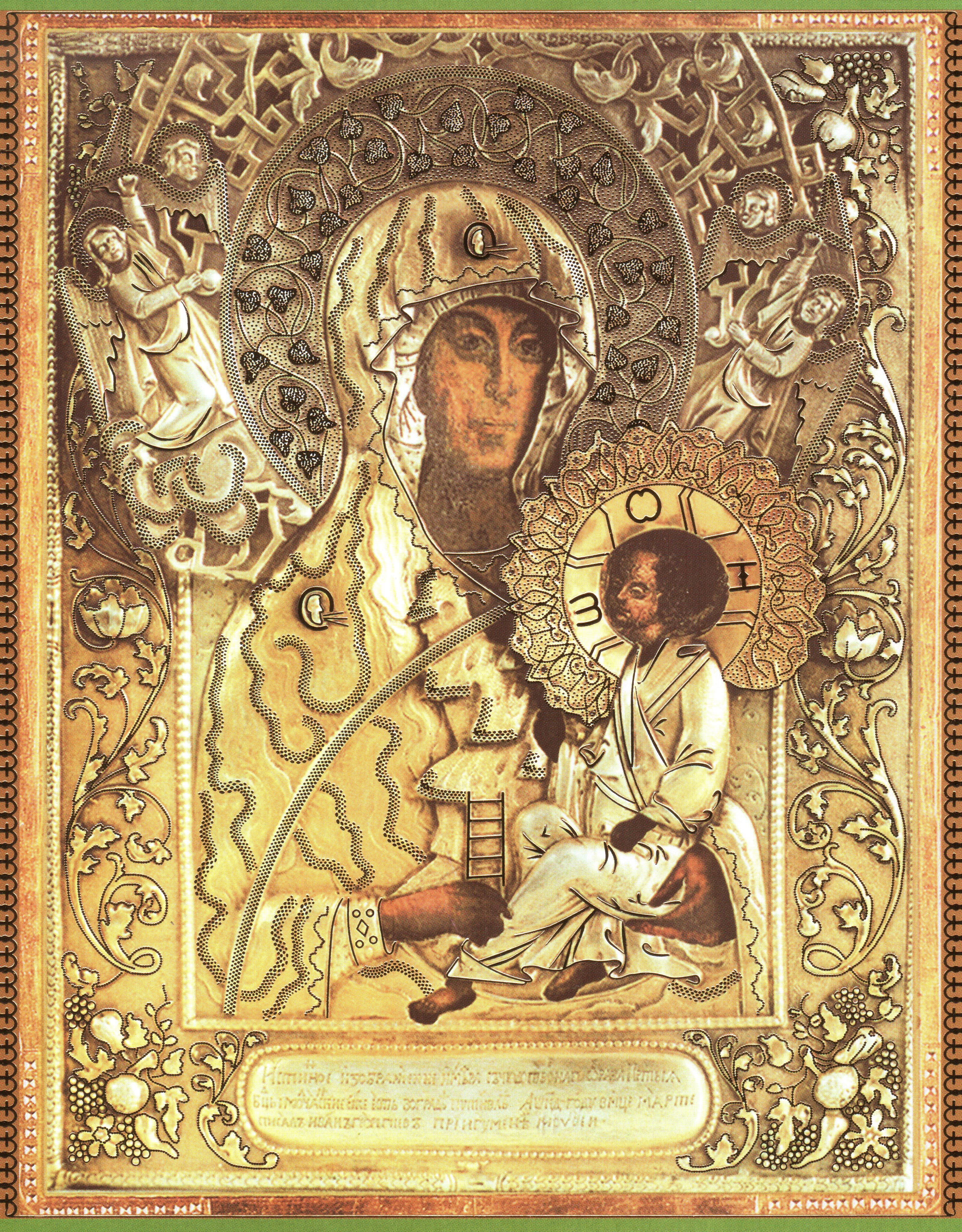 "Истинное изображение" чудотворной русской Молченской иконы Пресвятой Богородицы. 1405, Путивль. Находится в Молченском женском монастыре (Сумская область)..